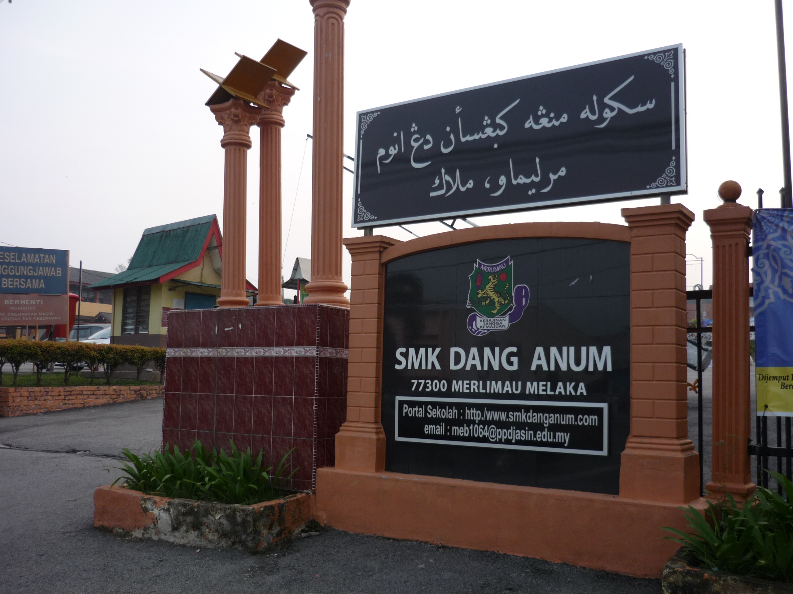 Pintu Masuk SMKDA